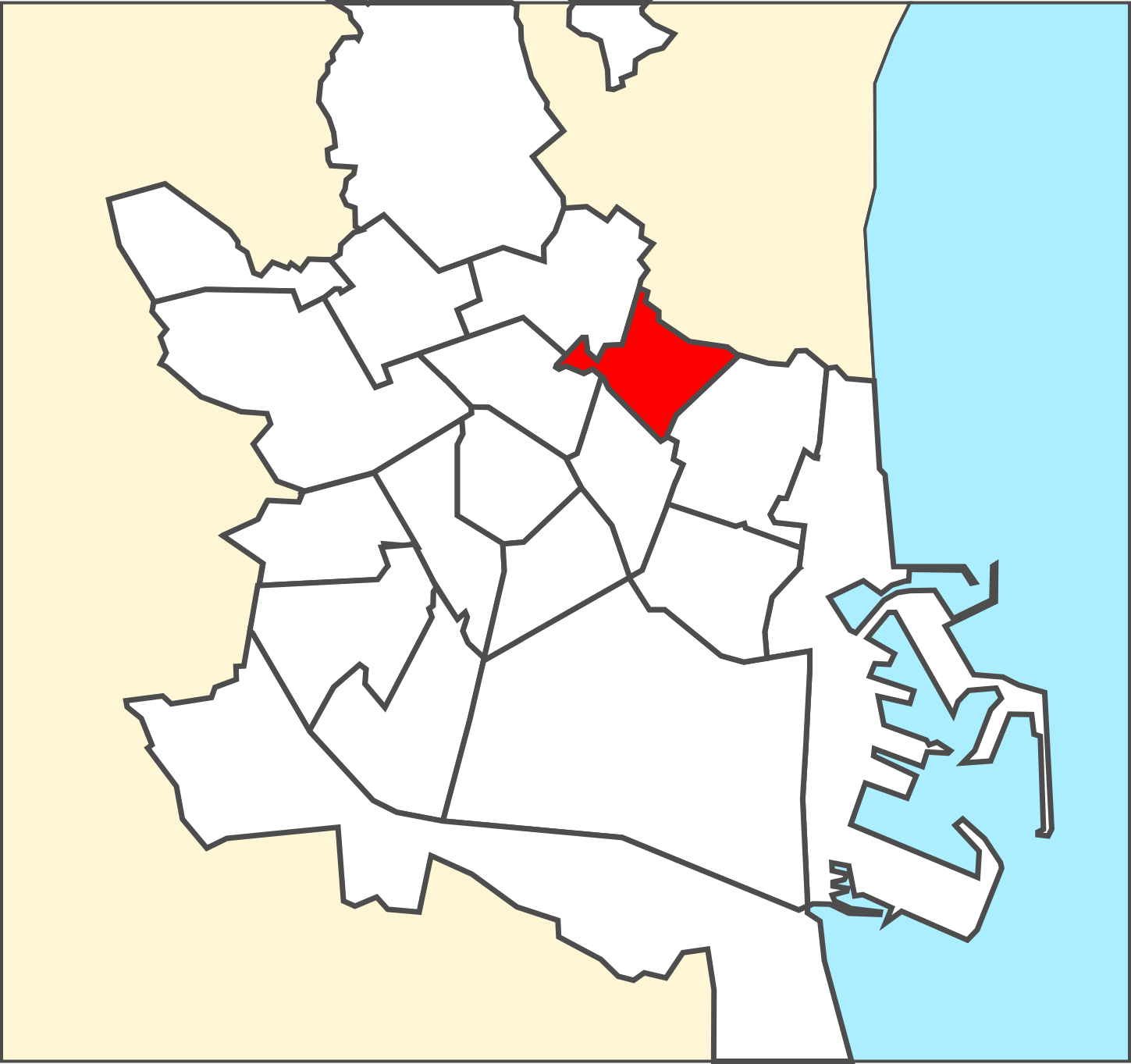 Districte de Benimaclet.